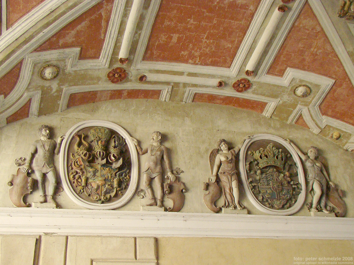 Schloss Güstrow, Baudetail im Tordurchlass